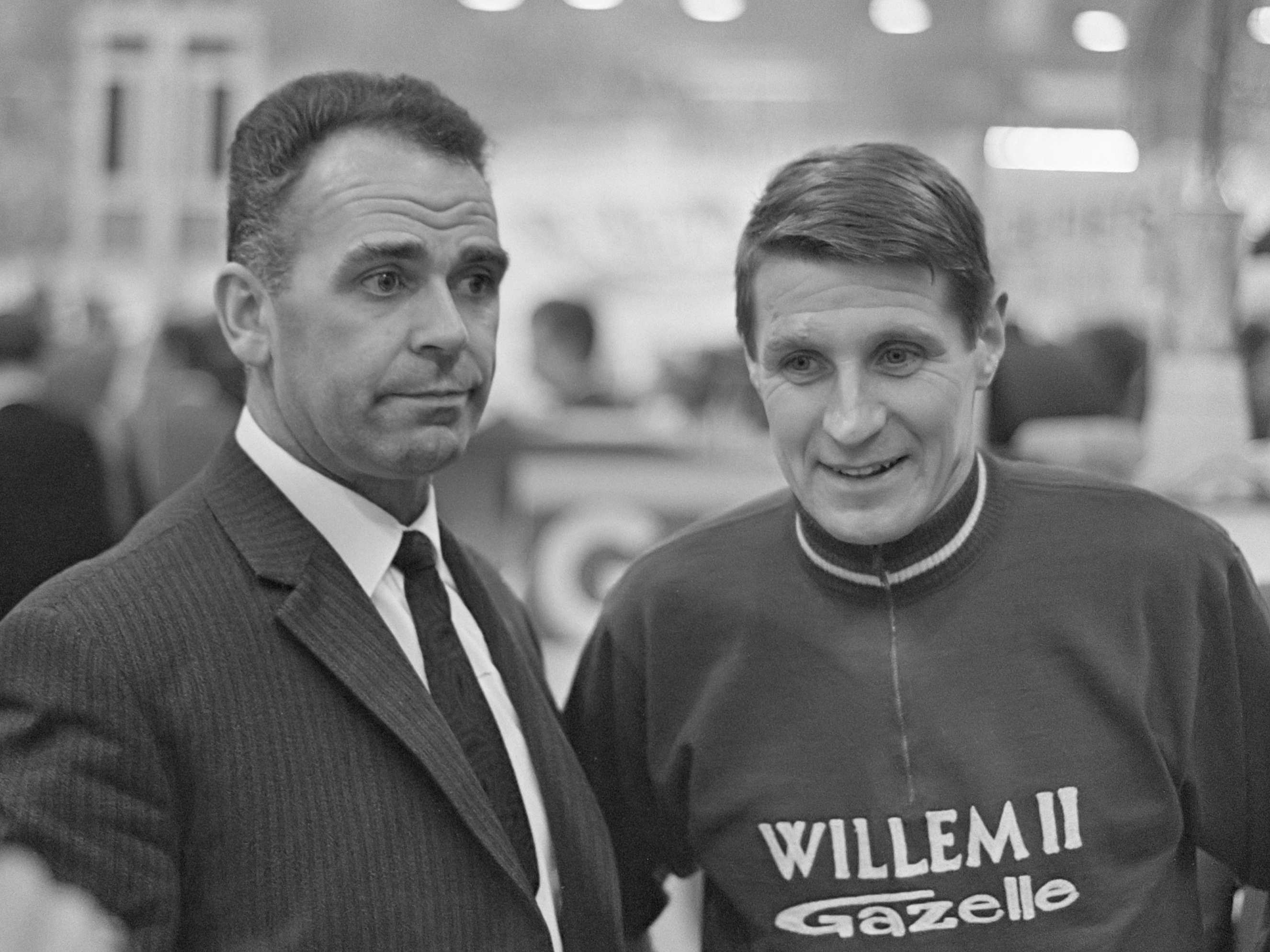 Zesdaagse Amsterdam, nummer 17, 18 en 19 - Rik Van Steenbergen (links) en Peter Post 7 december 1967